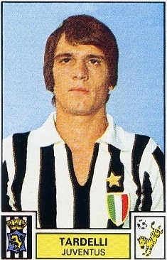 Marco Tardelli che indossa la maglia del Juventus